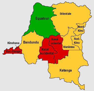 Results of the 2011 election in dr congo. Red - Joseph Kabila ; Blue - Étienne Tshisekedi ; Green - Léon Kengo